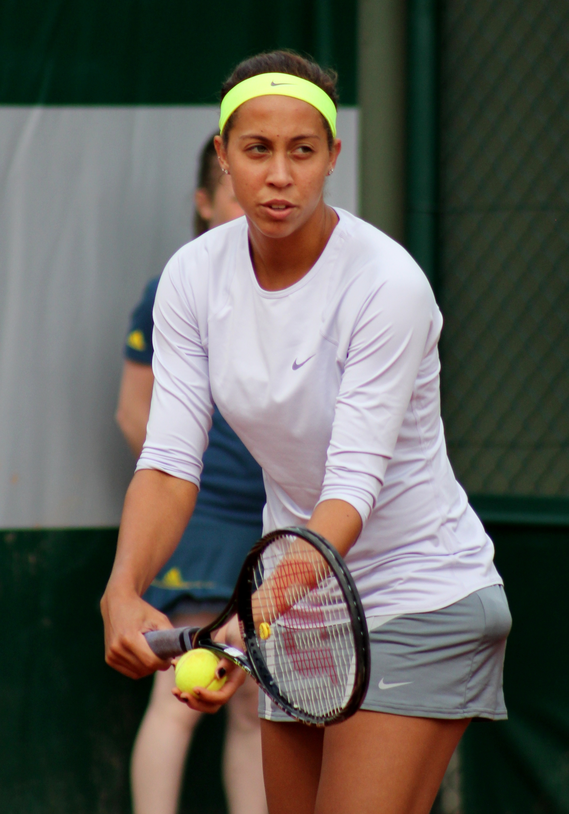 Keys RG13 (14)